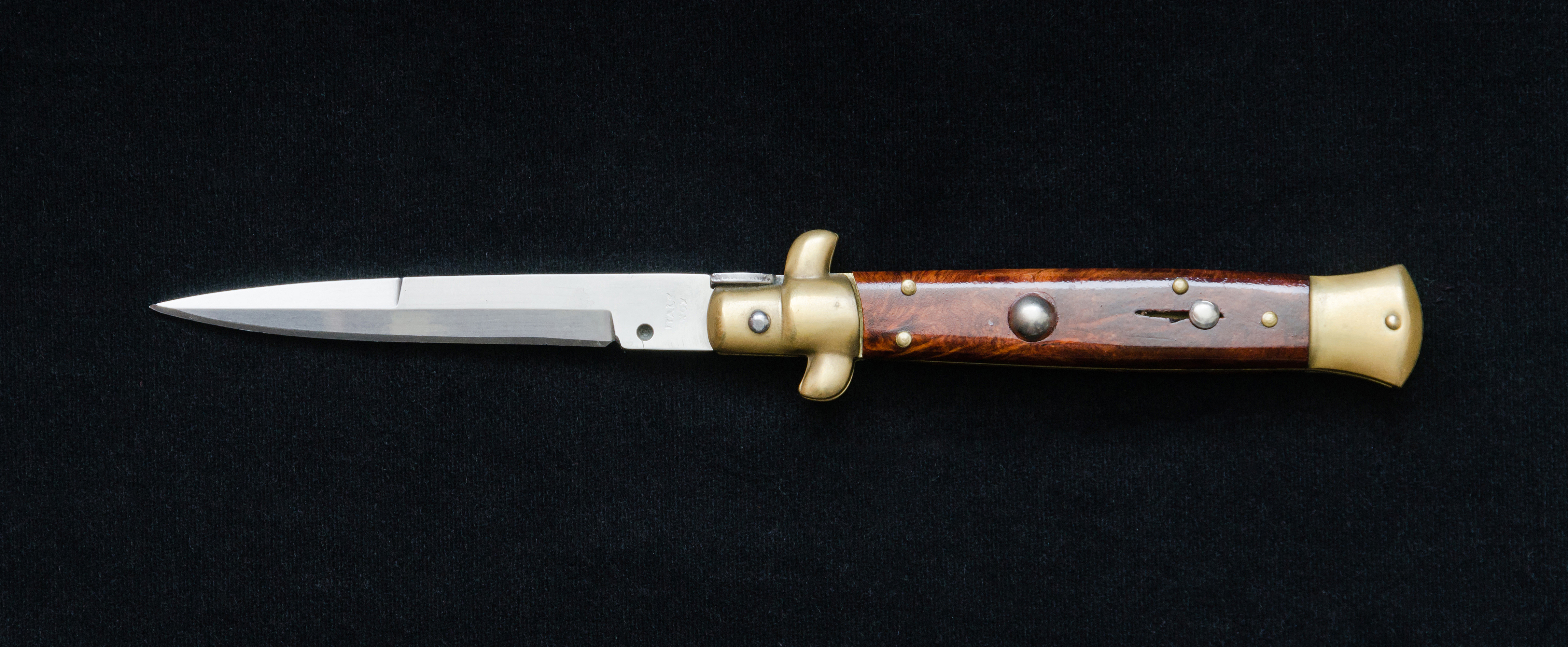 Nóż sprężynowy typu "Italian stiletto"